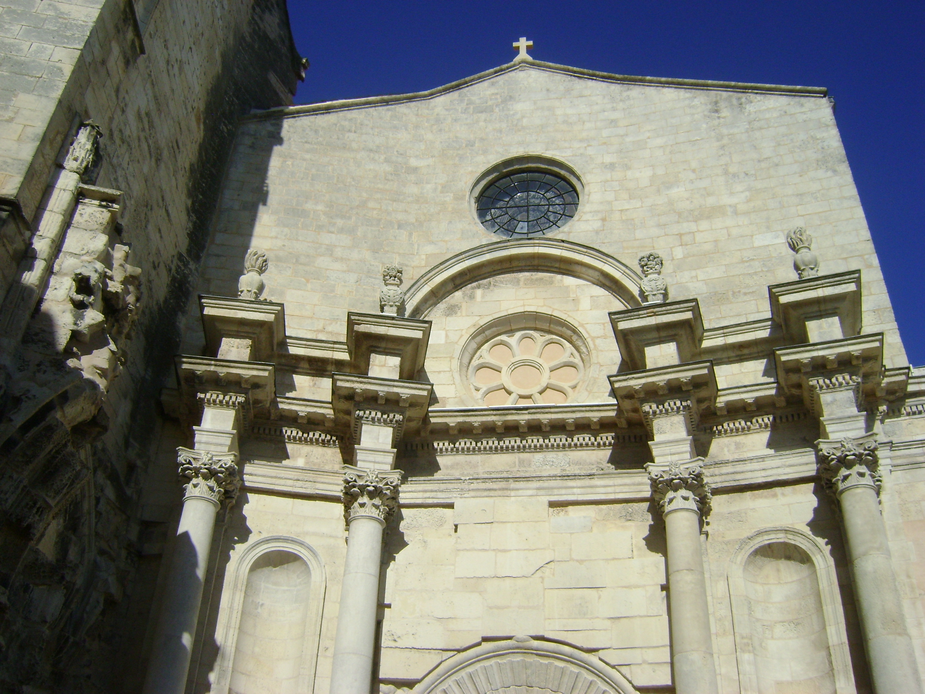 Eglise Saint-Sauveur de la Rochelle.